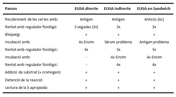 Taula descriptiva sobre els passos de les tècniques d'ELISA